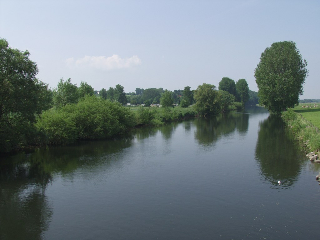 Ruhr bei Iserlohn-Drüpplingsen, 01.06.2003